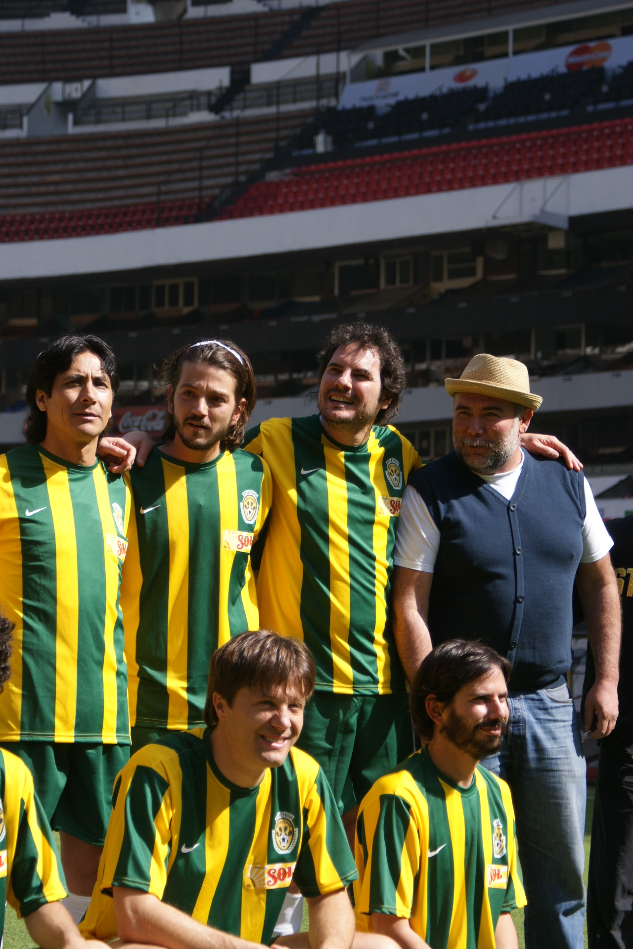 Diego Luna, Carlos Cuarón y Jesús Ochoa posan junto a un equipo deportivo.